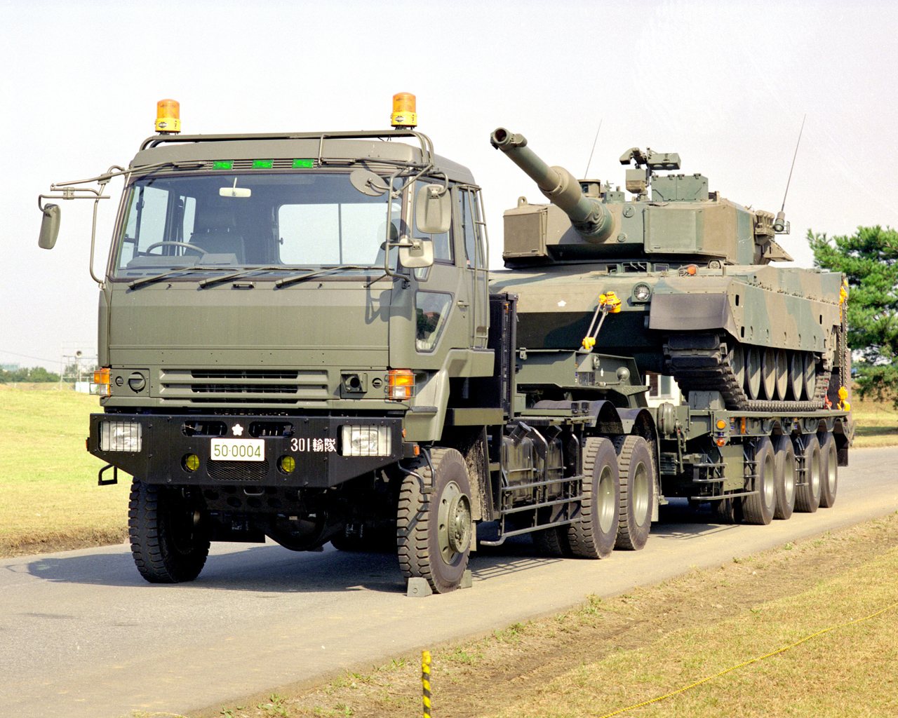 [全長]16.99m(7,335+11,545) [全幅]3.49m [全高]3.15m [車両重量]21,160kg(10,780+10,380) [最大積載量]50,000kg [最高速度]60km/h [最高出力]535ps [製作] ・けん引車：三菱ふそうトラックバス ・トレーラ：東急車両